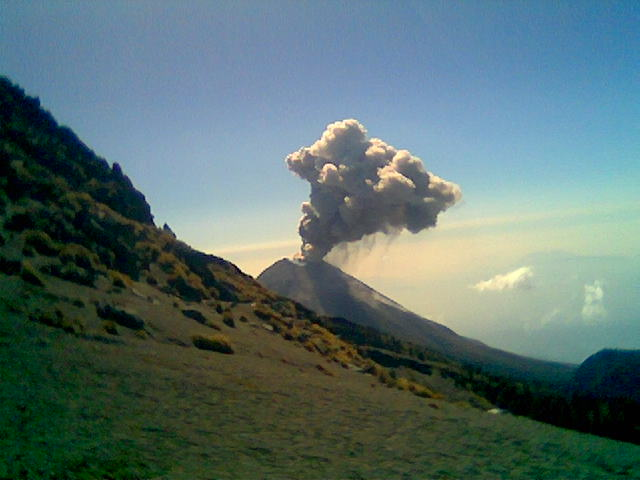 Exhalación del Volcán de Colima en el estado de Jalisco, vista desde le Nevado de Colima.